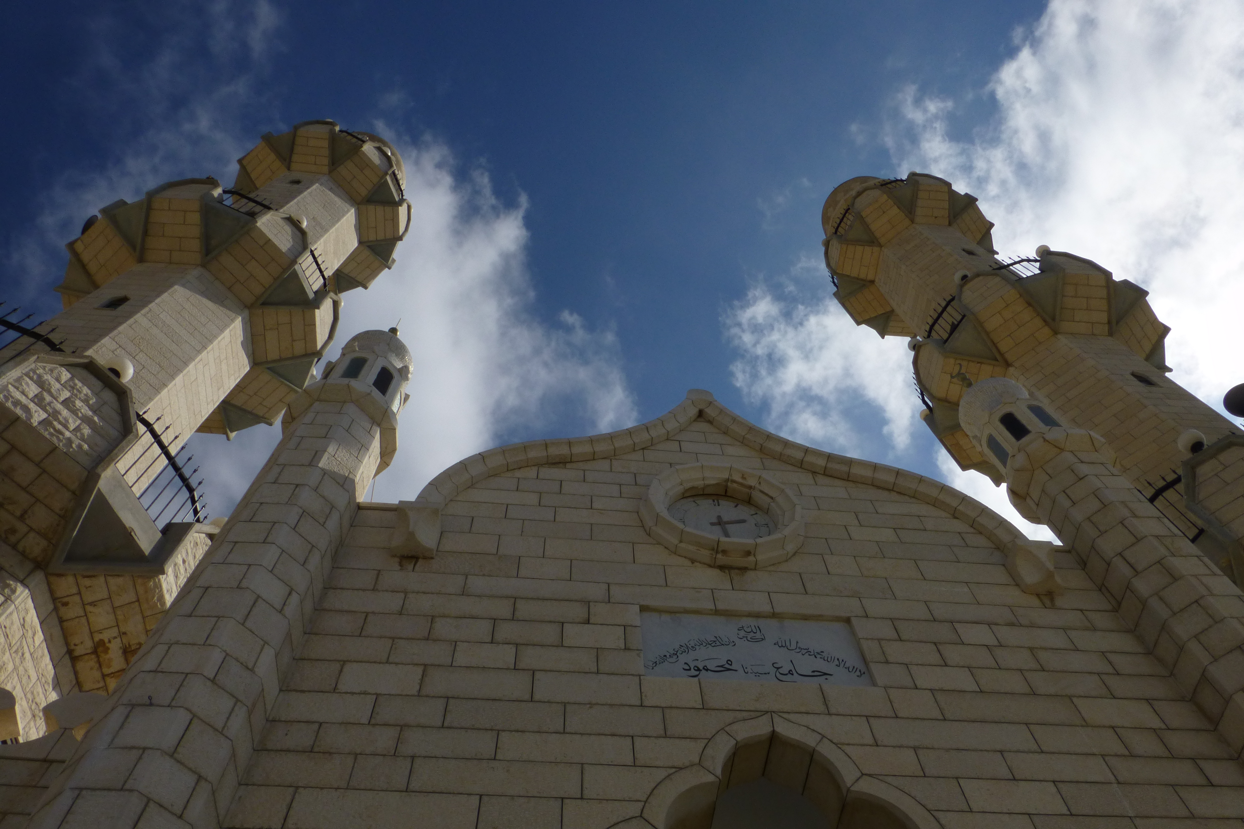 מסגד סיידנא מחמוד בשכונת כבביר בחיפה. מסגד זה משתייך לפלג האחמדים שנוסד בהודו ומטיף לנאורות, שלום ואהבה לאחר.